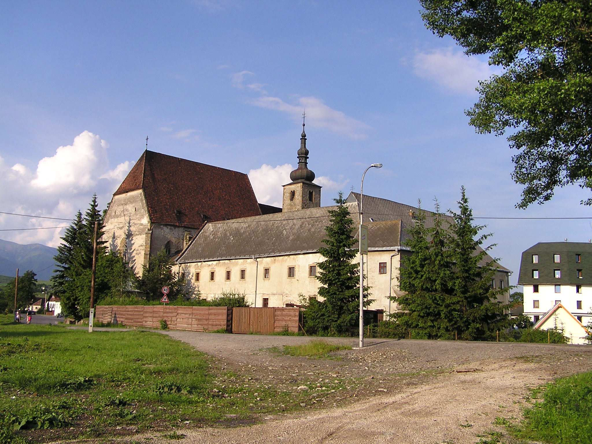 Kláštor františkánov